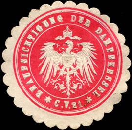 Sealing stamp Title: Beaufsichtigung der Dampfkessel Description: rot, weiß, geprägt Place: size: 4 cm